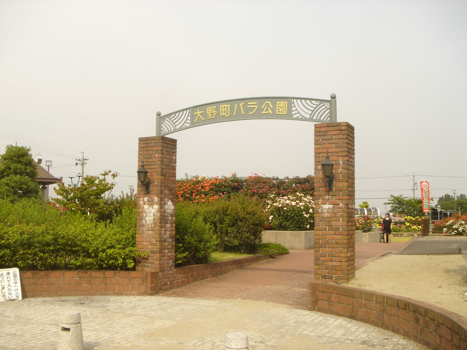 大野町バラ公園、岐阜県大野町